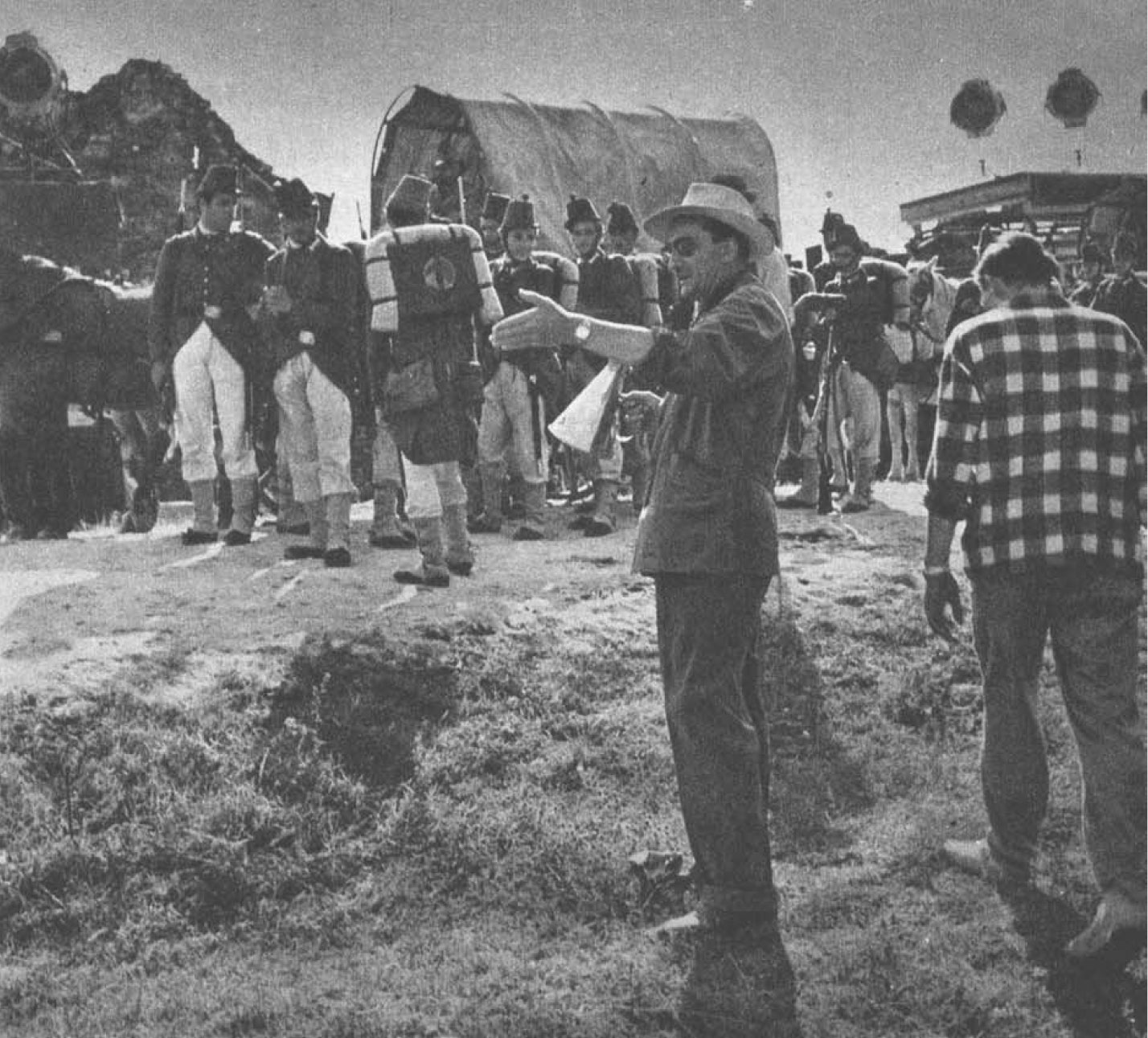 Luchino Visconti sul set di "Senso" - 1954